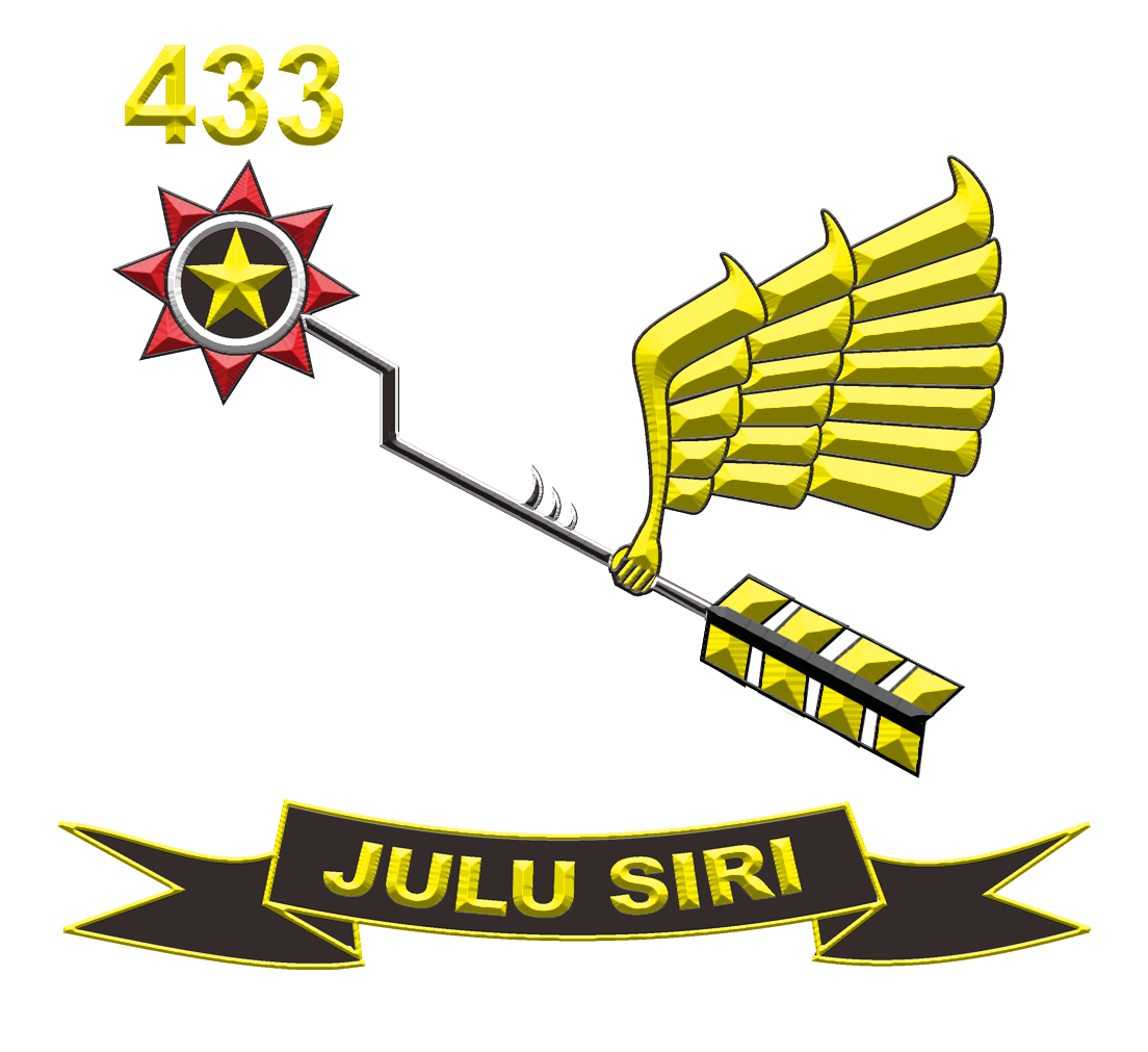 yonif para raider 433/julu siri